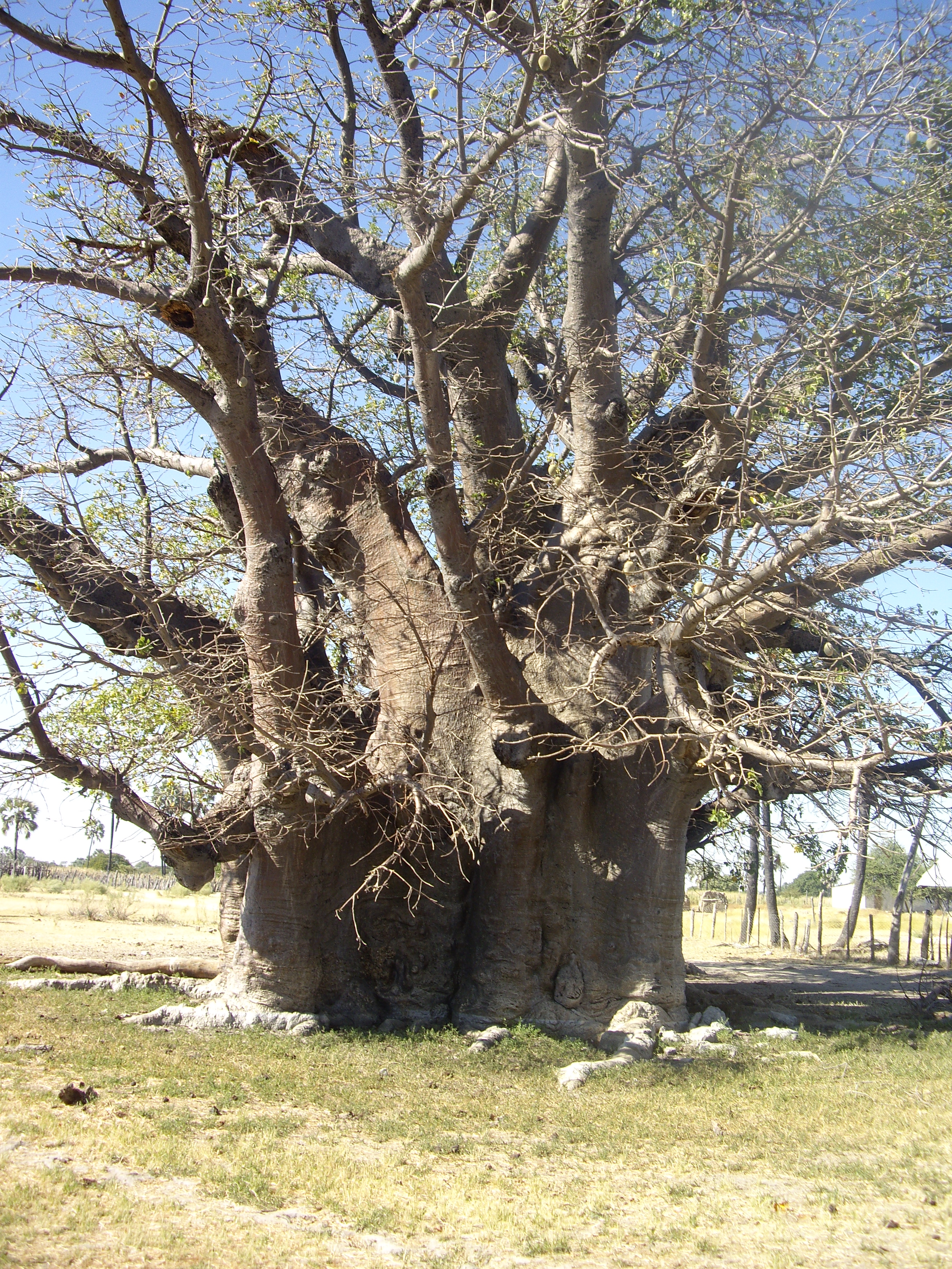 Stattlicher Baobab-Baum in Tsandi.